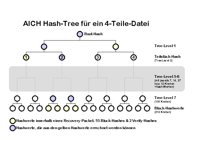 AICH Hash Tree einer Datei mit 4 Teilstücken